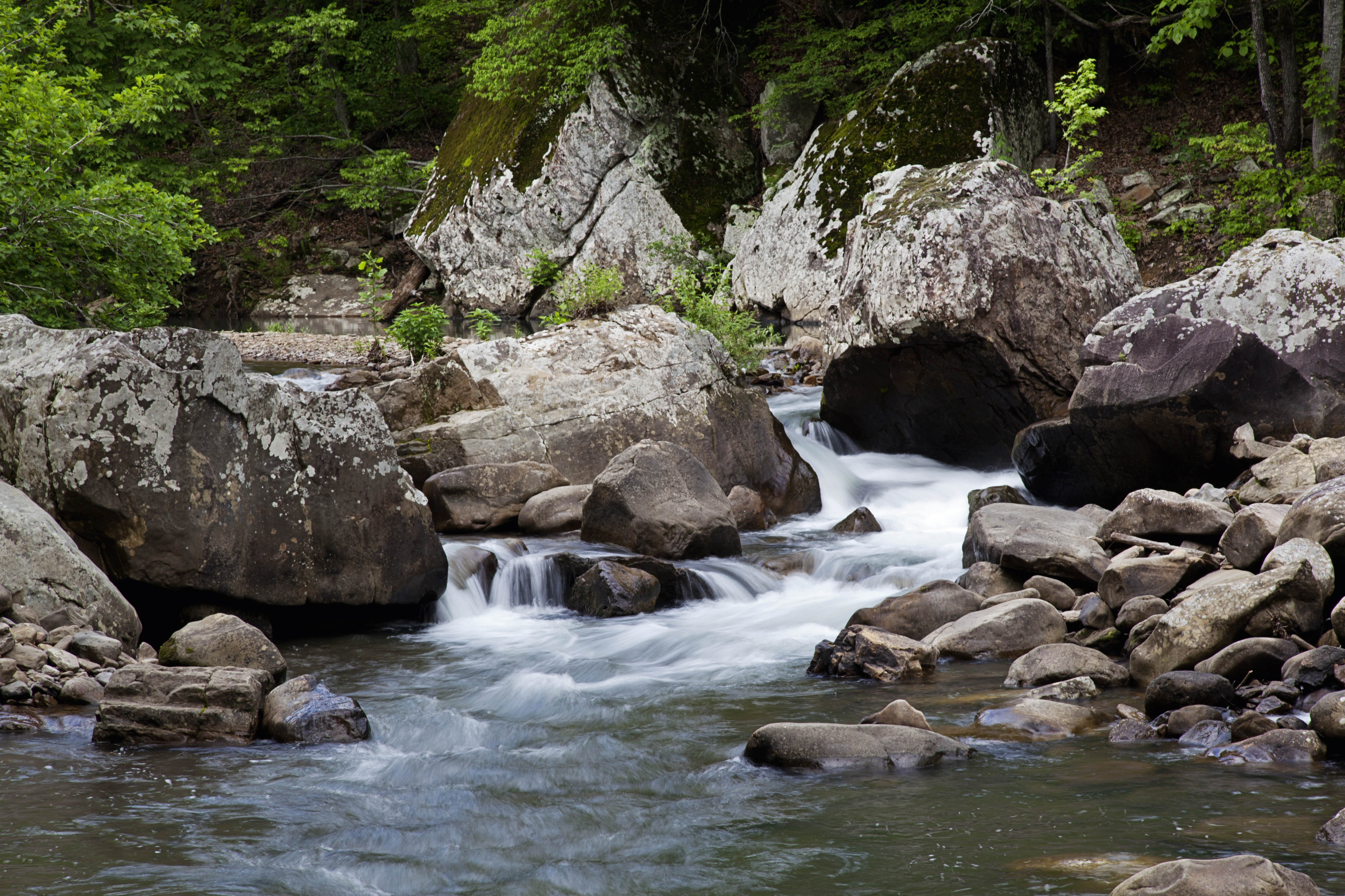 Richland Creek Wilderness Ben Hur, Arkansas